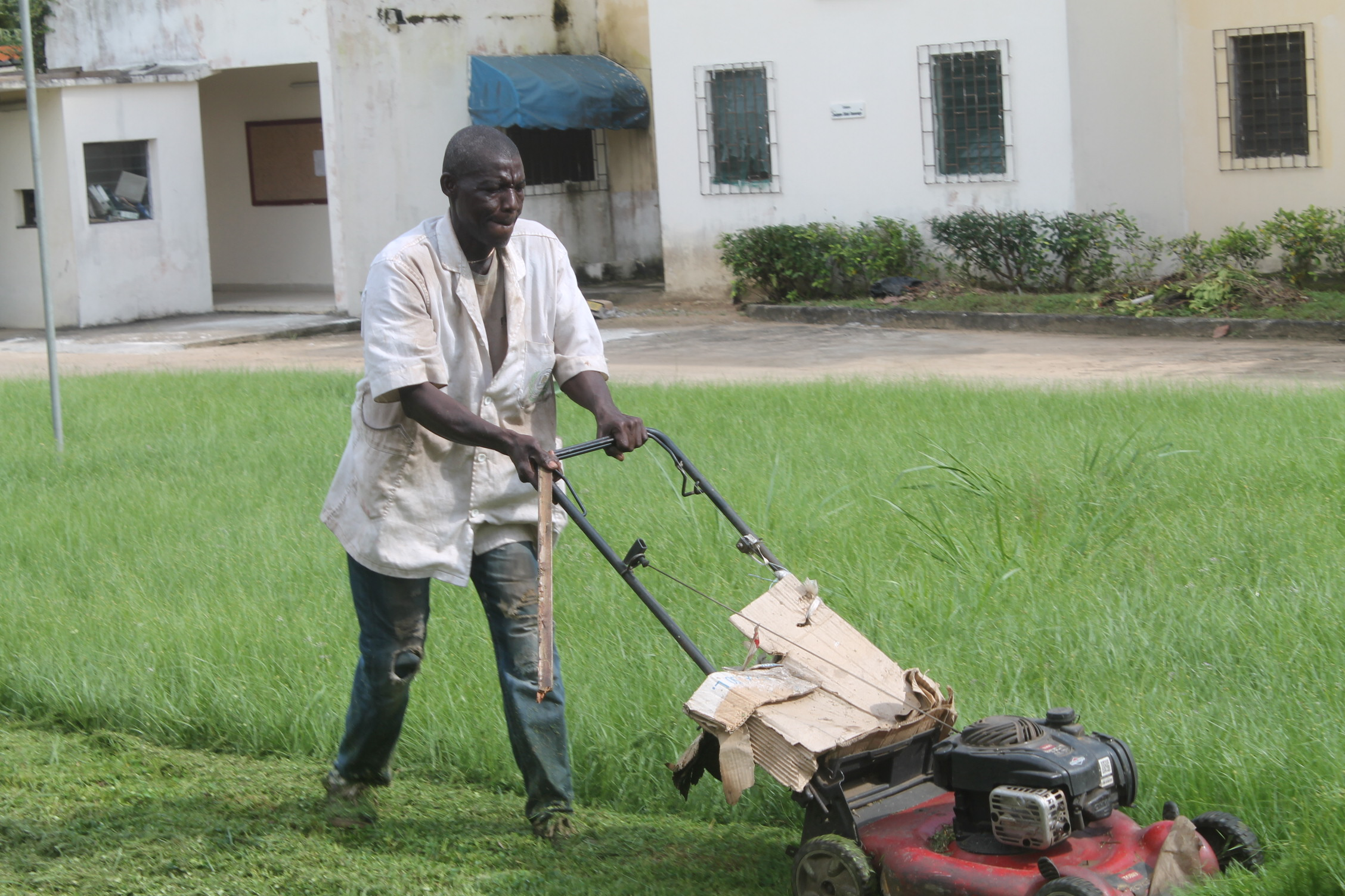 prendre soin de son cadre de vie à l'instar de ce Jardinier Ivoirien This is an image of "African people at work" from Ivory Coast